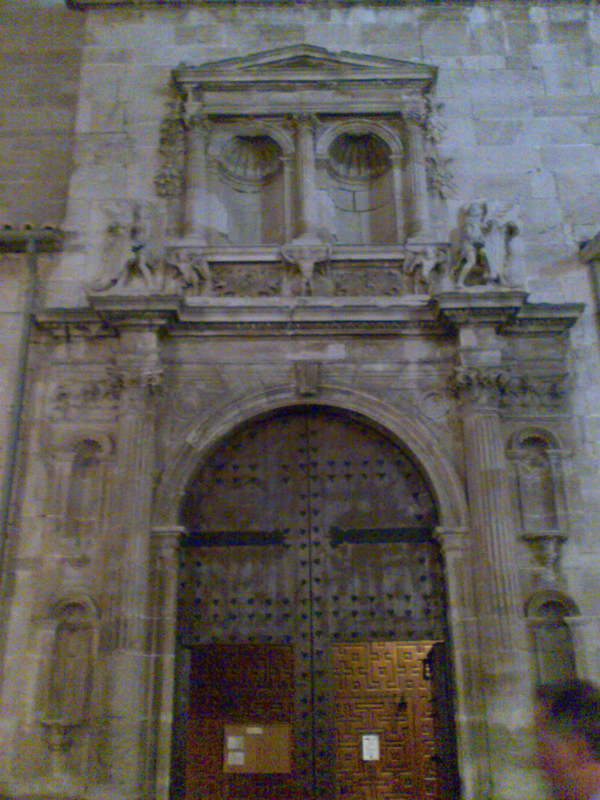 Puerta lateral de la Iglesia de las santas Justa y Rufina de Orihuela.